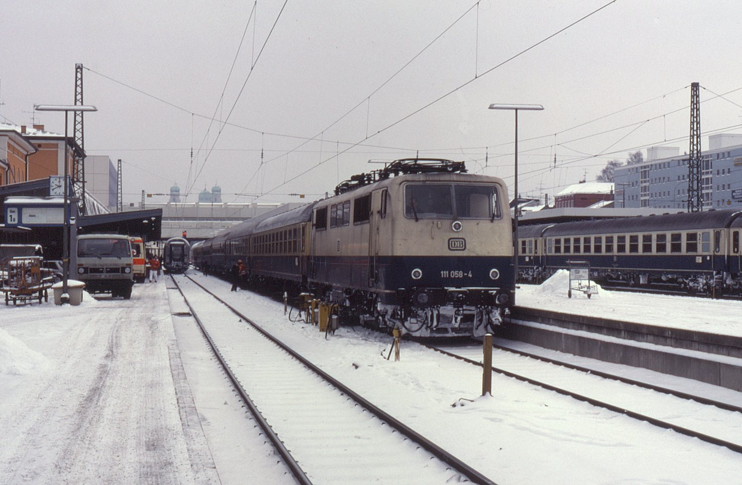 111.058 at Passau Hbf, 14 May 1991.